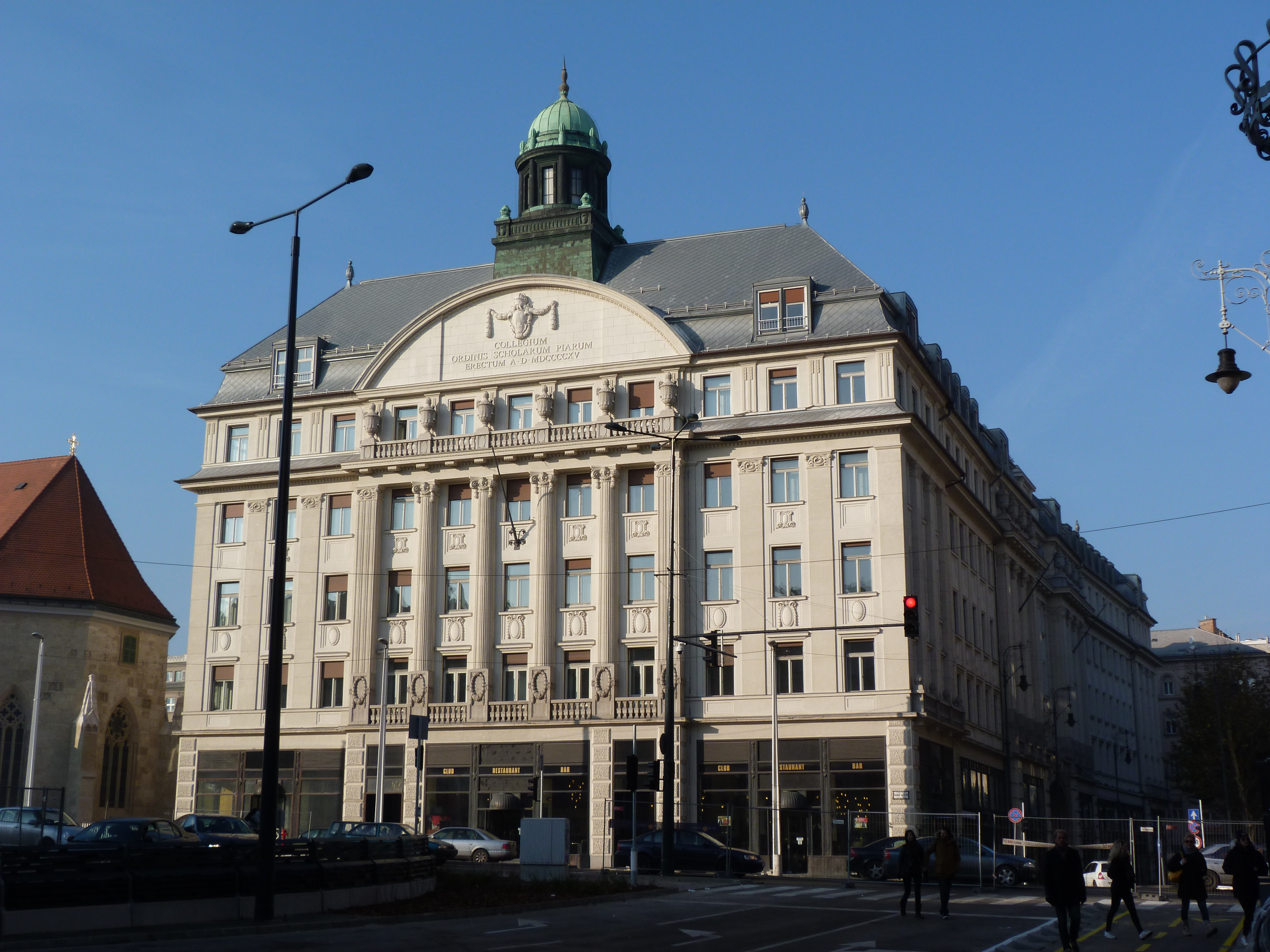 A felvétel 2013. december 21 -én készült Budapest Belvárosában. Sapientia Szerzetesi Főiskola. ©© Derzsi Elekes Andor, Budapest, 2013, A kép egészben, vagy részletekben másolását, bármilyen úton történő sokszorosítását és felhasználását a szerző ellenérték nélkül, jogutódjaira is kihatóan megengedi. Az engedély kiterjed a kereskedelmi célú hasznosításra is. Kéri azonban nevének feltüntetését a felhasználás során. A Metapolisz sorozat valamennyi képe és filmje Creative Commons alatti valamint kereskedelmi - for profit - célra is felhasználható. Ajánlott hivatkozás: Derzsi Elekes Andor: Metapolisz DVD line